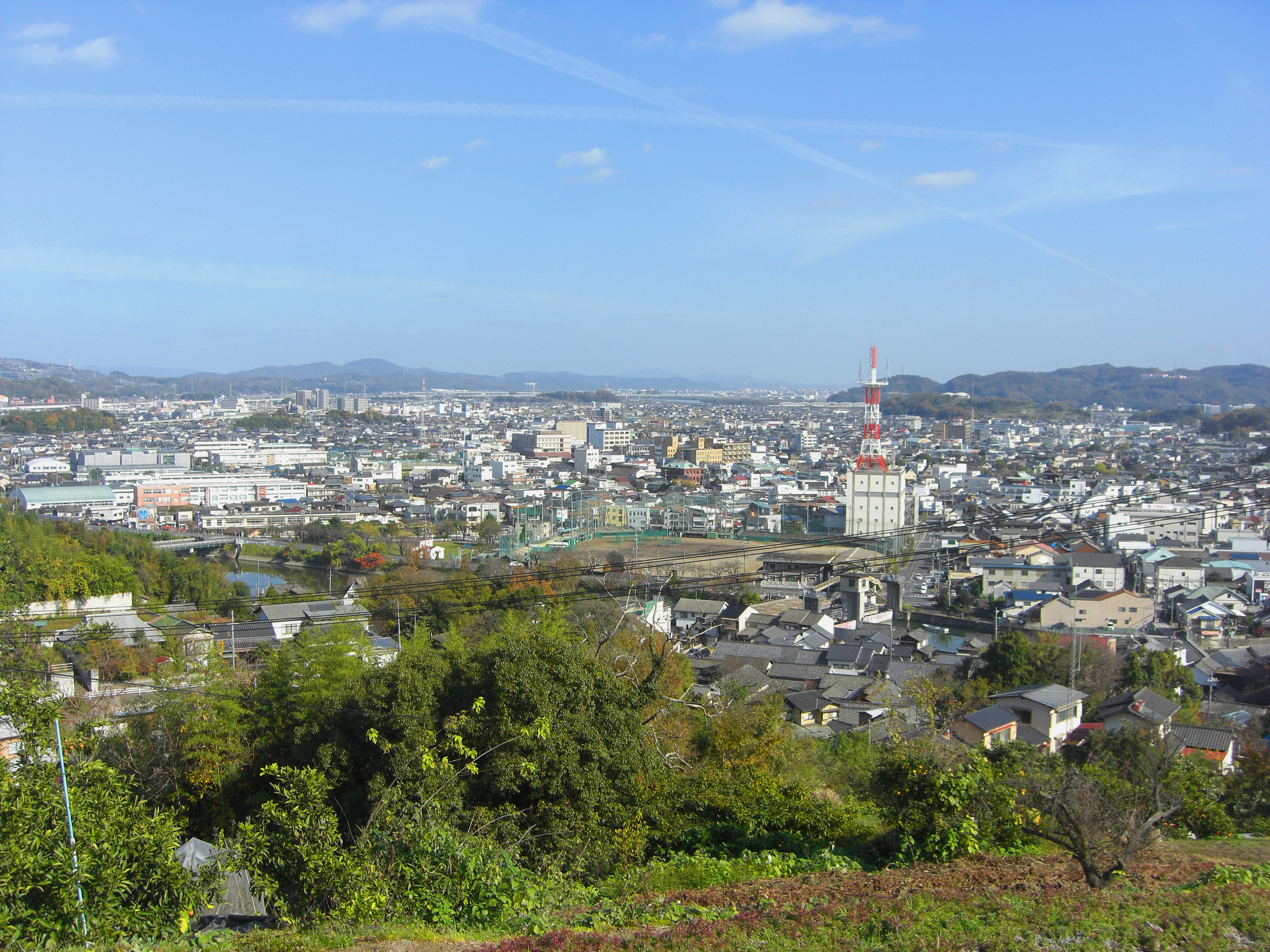 岡山県倉敷市玉島地域の新旧市街地の景色を、円通寺駐車場（玉島柏島）より撮影しました。 色の鮮やかさを調整しています。